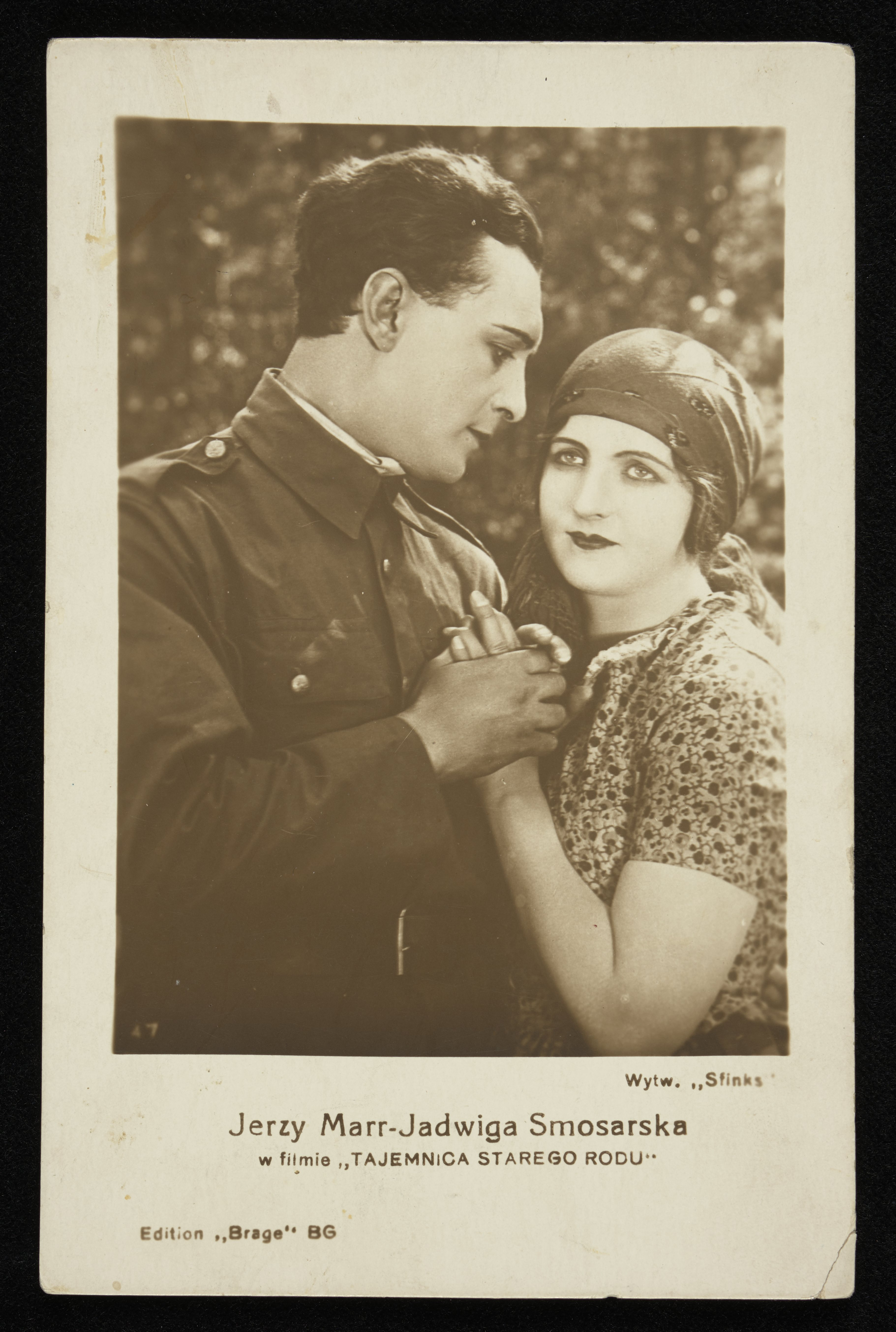 Jerzy Marr i Jadwiga Smosarska w filmie "Tajemnica starego rodu", 1928 r.